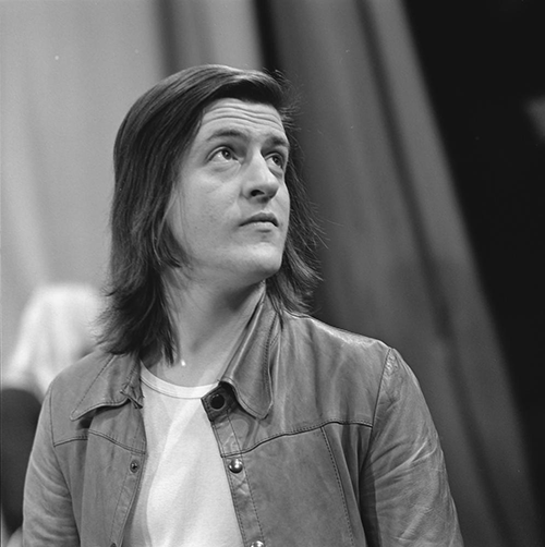 Ton van der Kleij, drummer of Dutch music group Earth & Fire